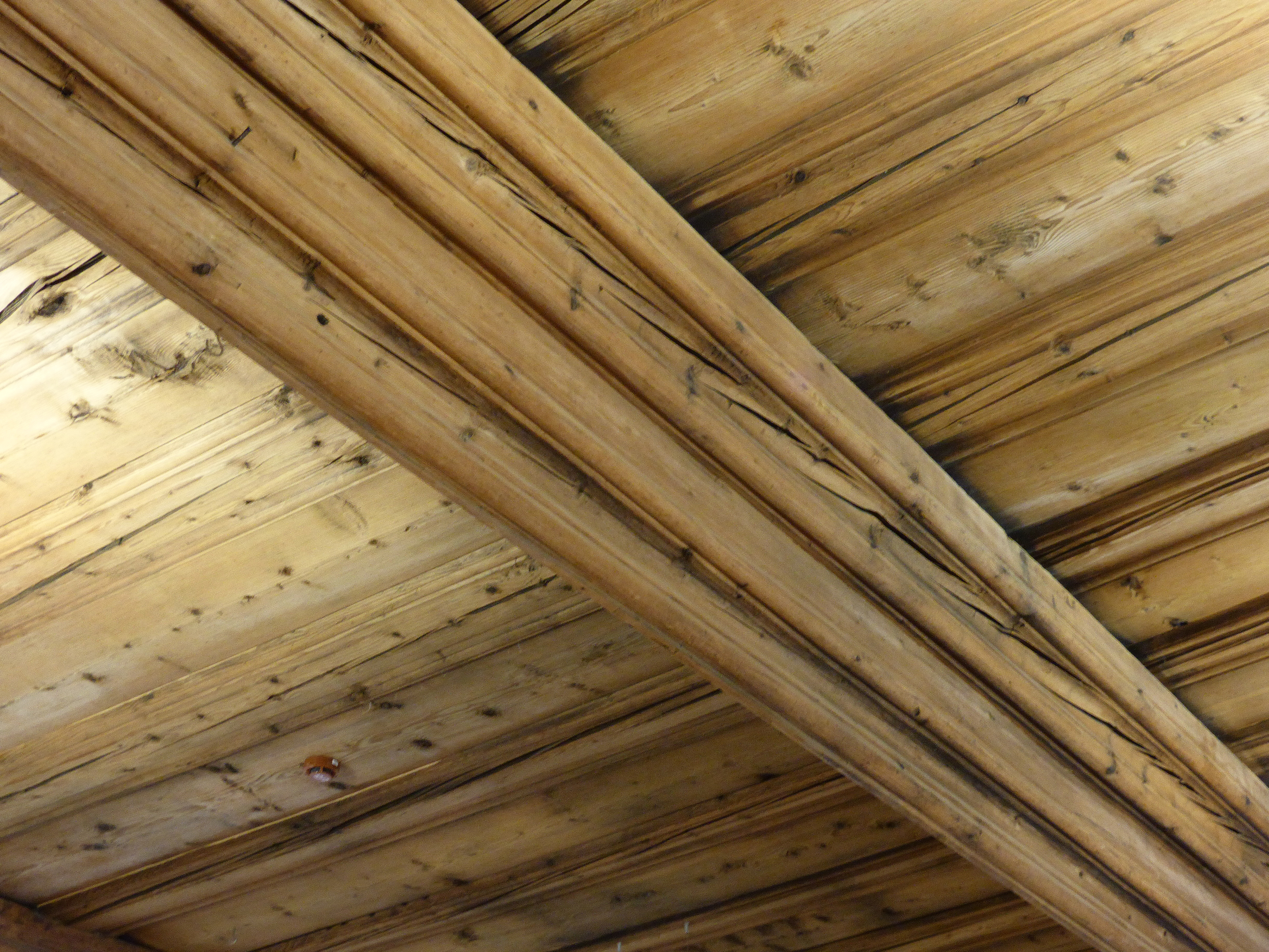 Historische Holzdecke im Museum Schloss Wolkenstein (Erzgebirge).